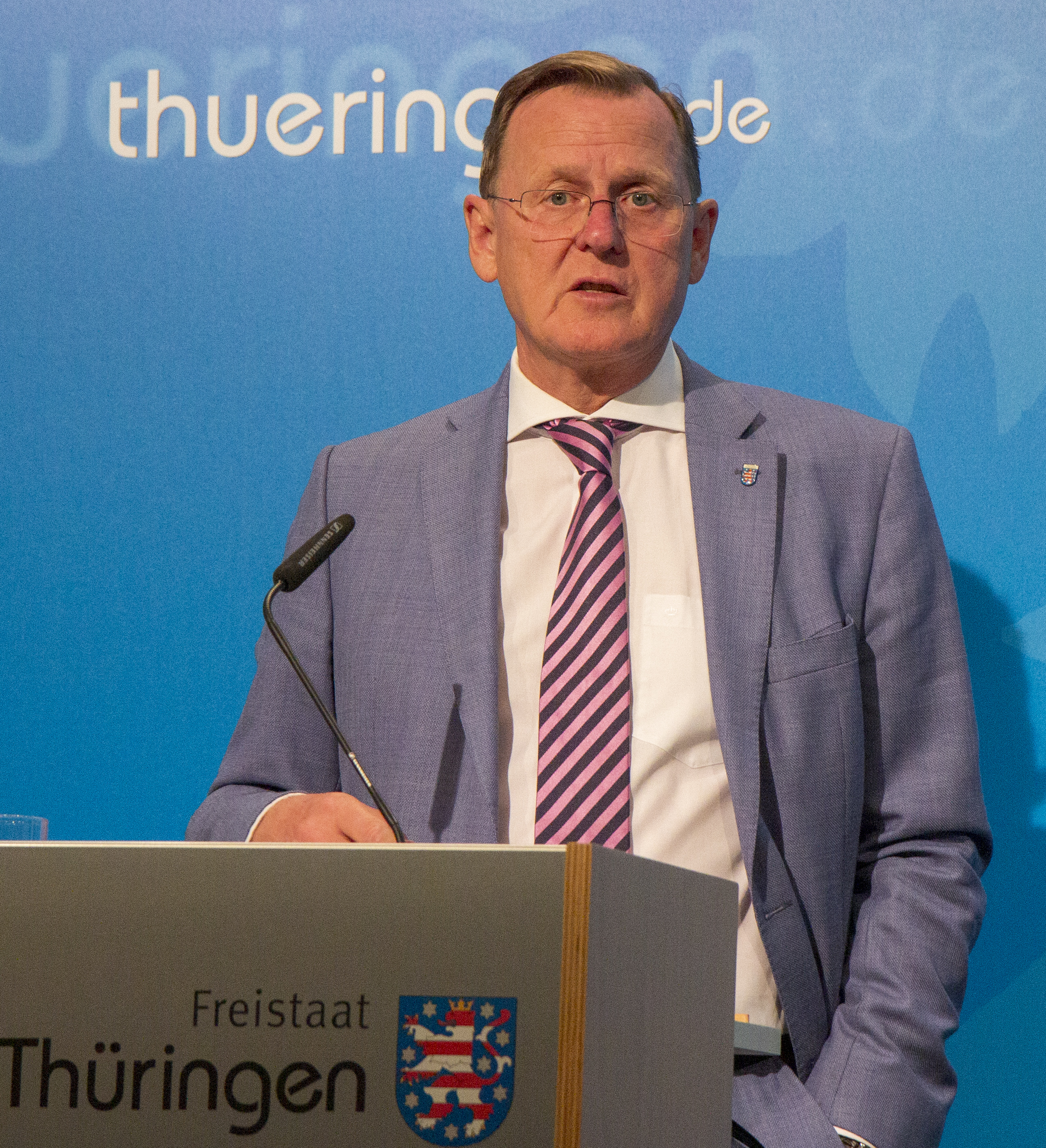 Bodo Ramelow während der Regierungsmedienkonferenz am 3. September 2019 in der Thüringer Staatskanzlei in Erfurt